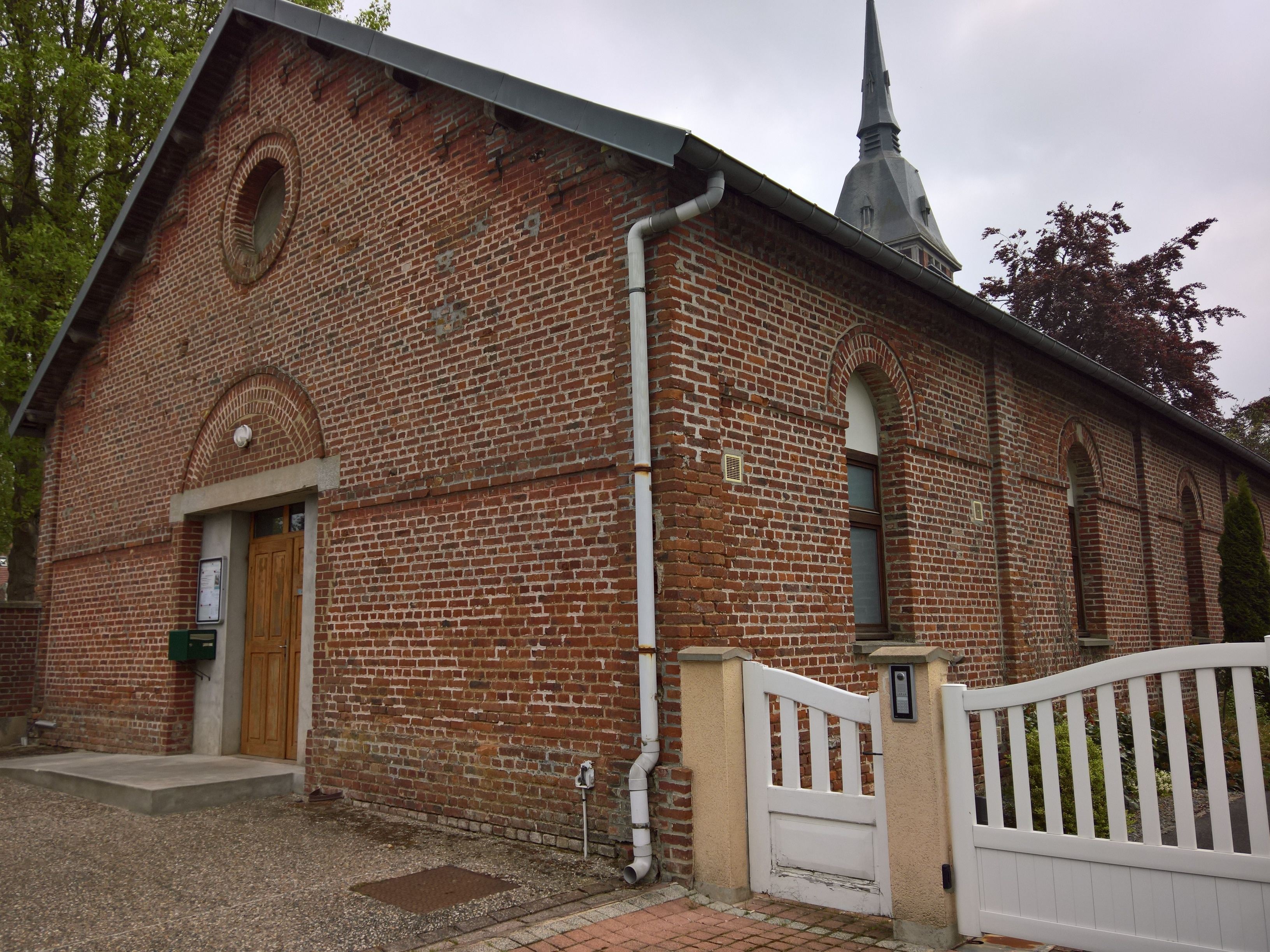 Villers-Bretonneux : Église Saint-Jean-Baptiste : vue générale